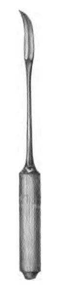 Segondsches Myommesser: Messer zum Morcellement von Myomen